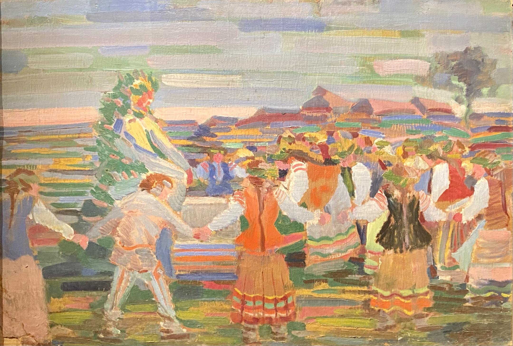 Карагод (Ляльнік)